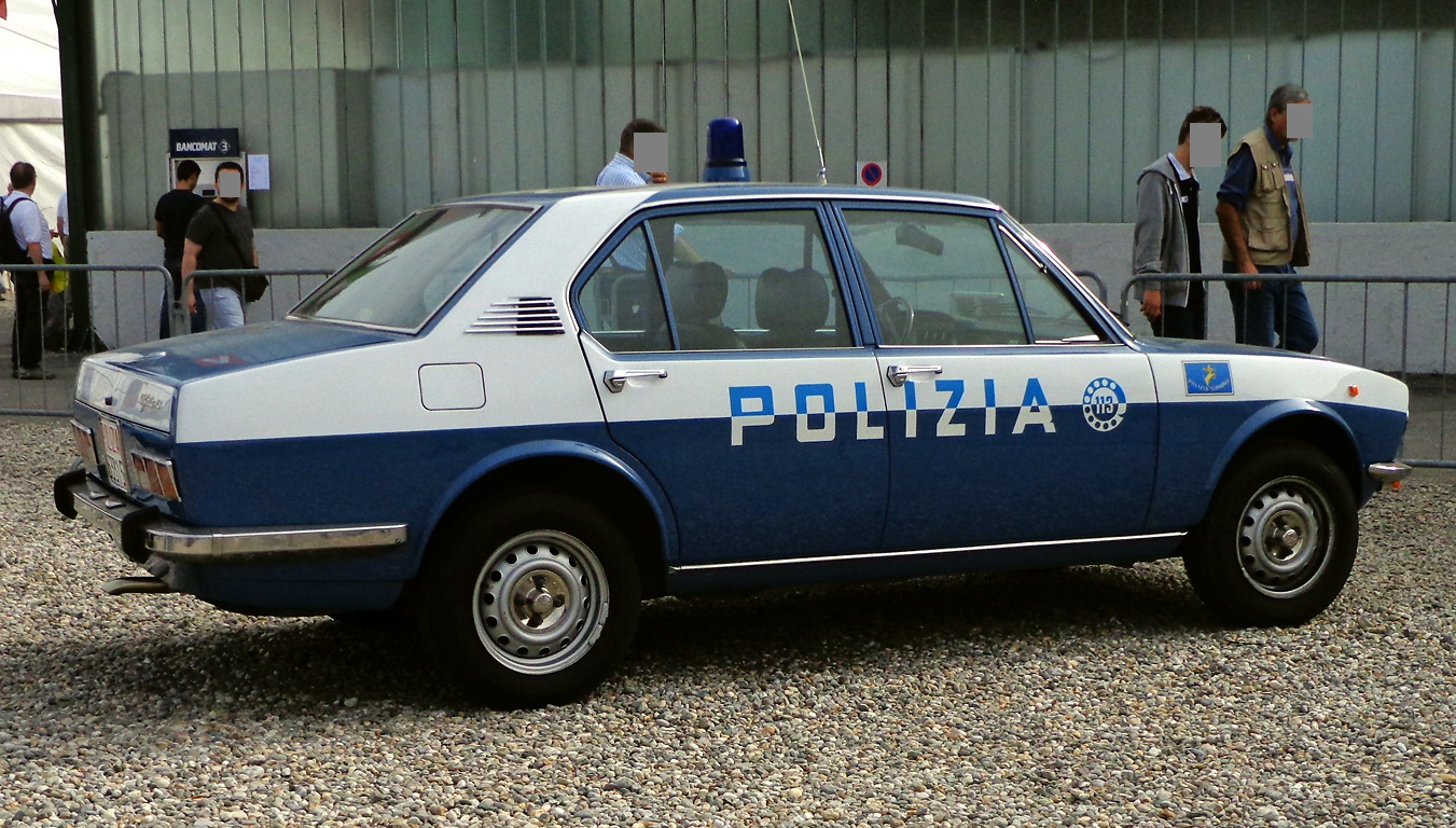 Un'Alfa Romeo Alfetta della Polizia di Stato, esposta alla fiera "Hobby Model Expo" di Novegro del 2013.